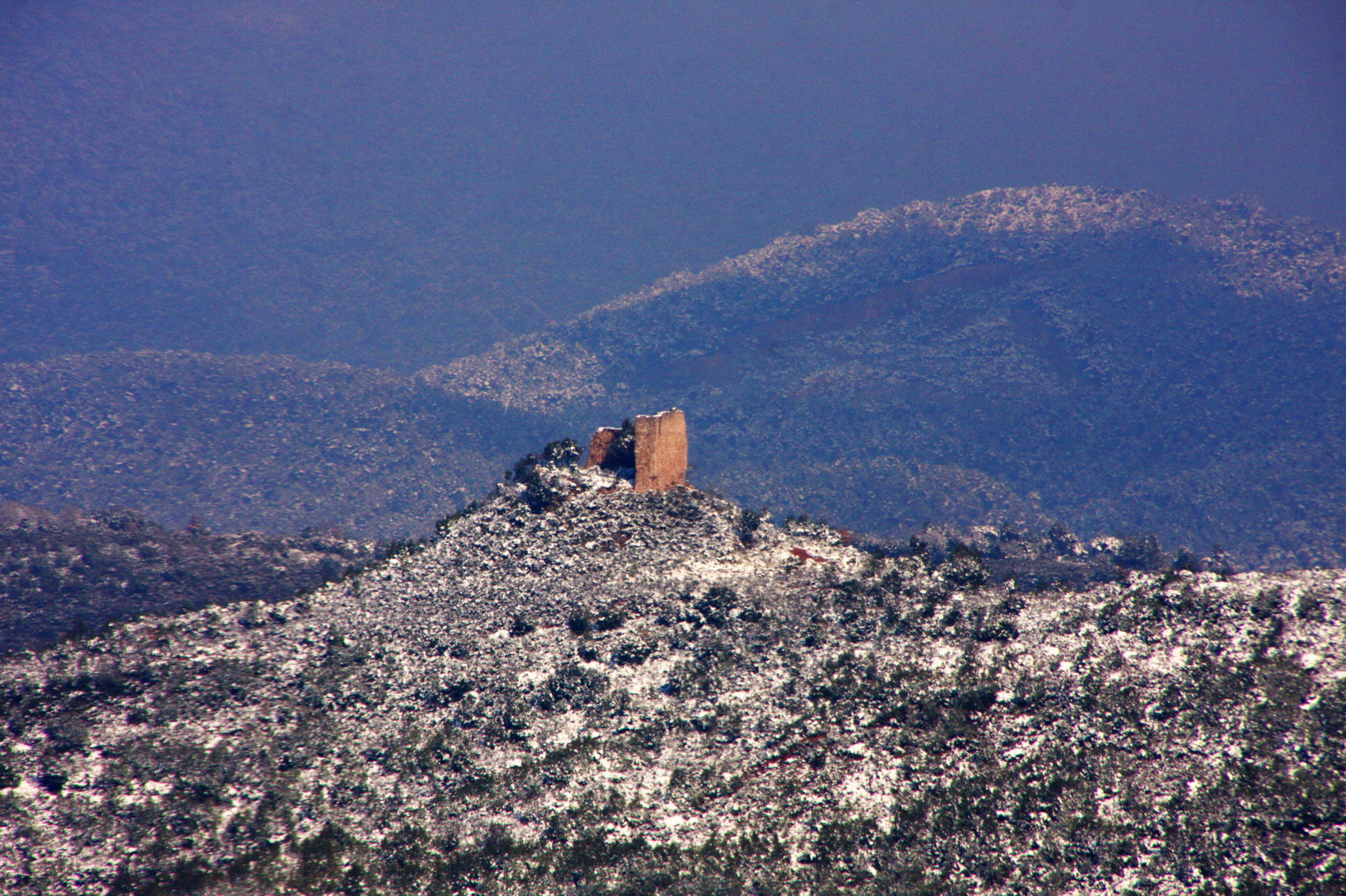 Castell de Montmany (Figaró-Montmany)